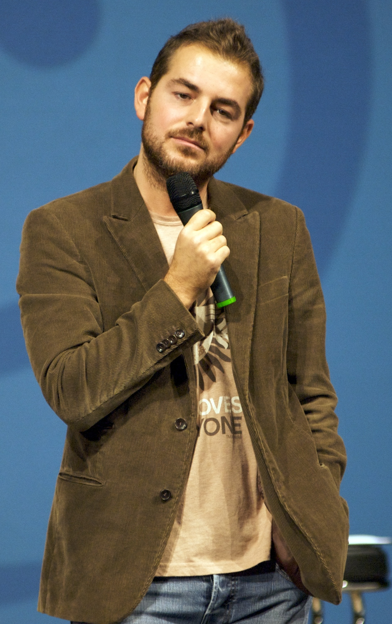 Daniele Bossari